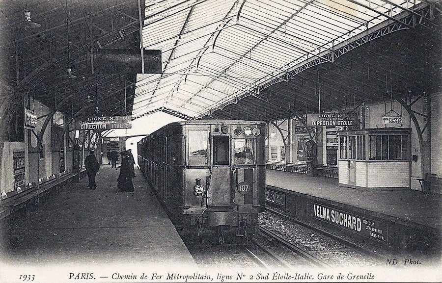 Métro de Paris, Ligne 2 Sus, Station Grenelle, Carte Postale 1933, domaine public